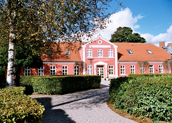 Billede af Castberggårds Hovedbygning i Urlev, Region Midtjylland